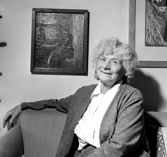 bolig, interiør, portrett, kvinne, kunsthistoriker, forfatter, Munch-maleri. Rigmor Dahl Delphin (1908-1993) var ansatt som fotograf i ukebladet Alle Kvinner. Hennes negativarkiv ble i 2005 overført Oslo Bymuseum fra Gyldendal Norsk Forlag som var utgiver av bladet.